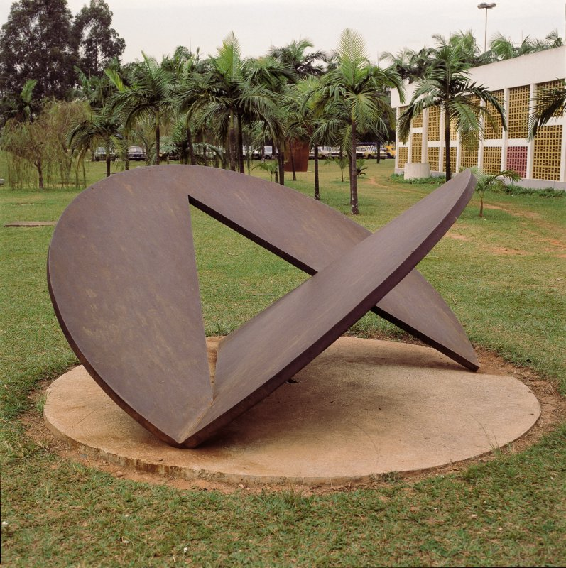 Jardim das Esculturas do MAC/USP. Em primeiro plano, escultura de Amílcar de Castro (1920-2002).